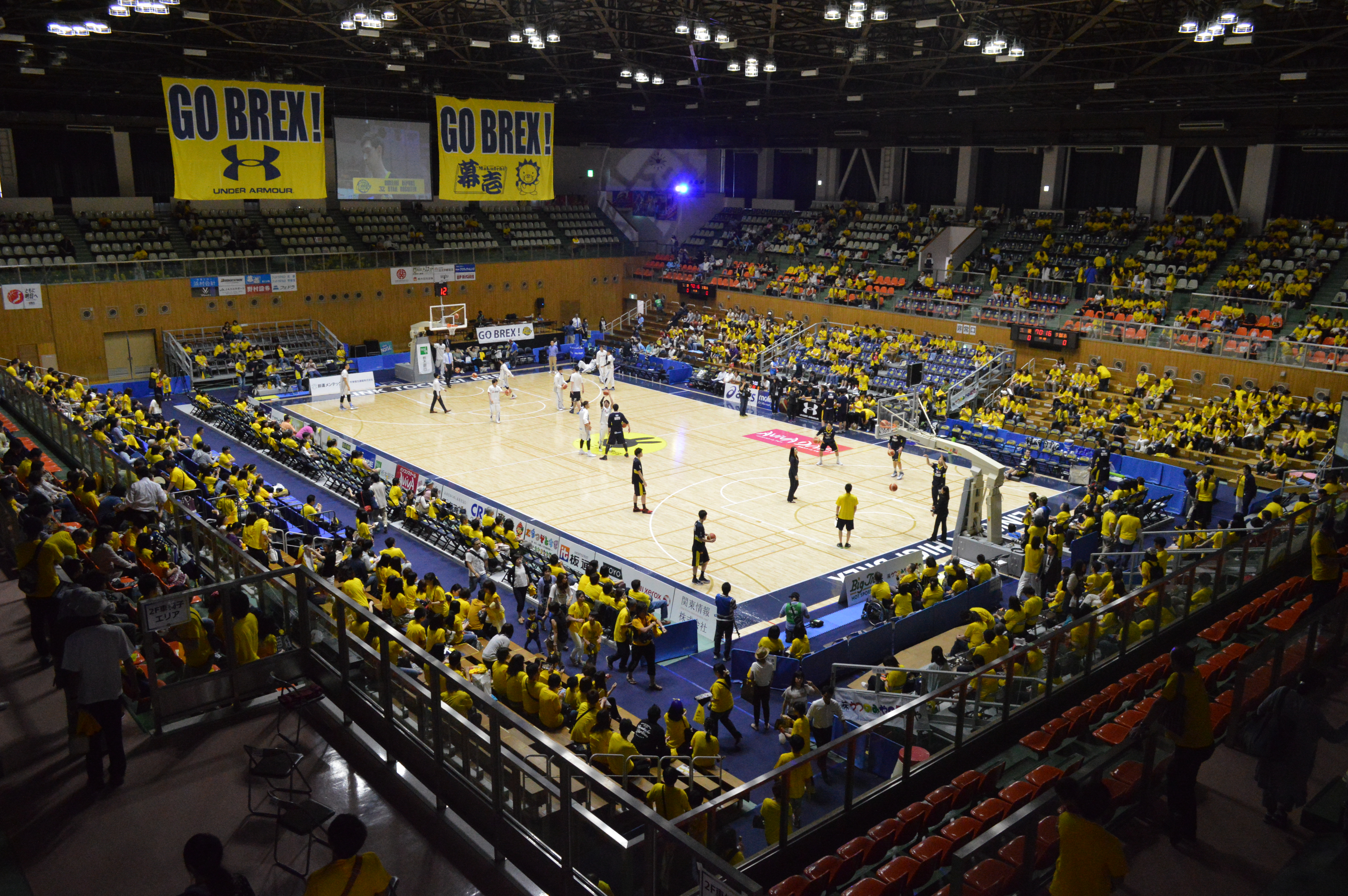 宇都宮市体育館（ブレックスアリーナ宇都宮） リンク栃木vs三菱電機ダイヤモンドドルフィンズ